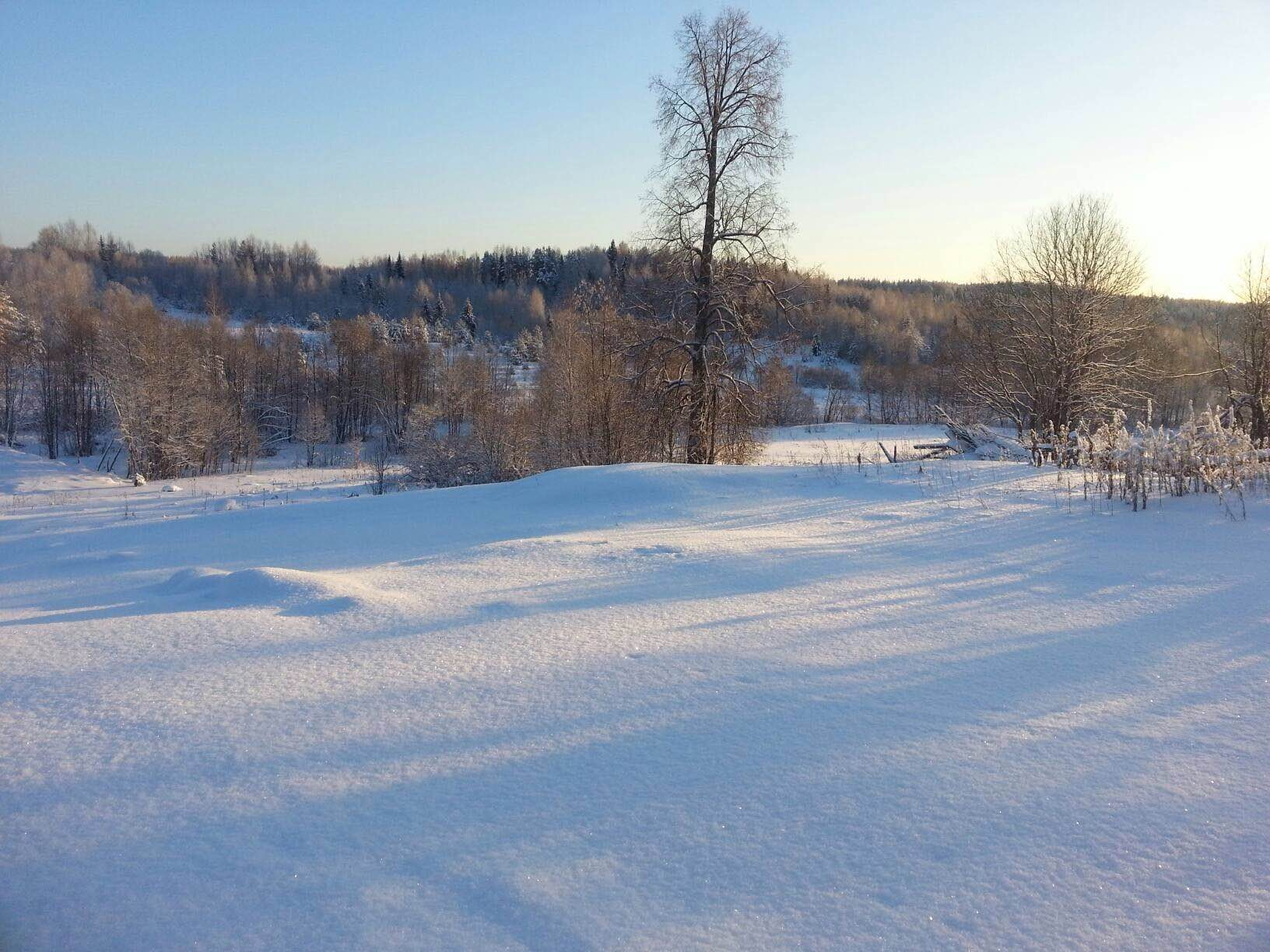 одинокая старая липа